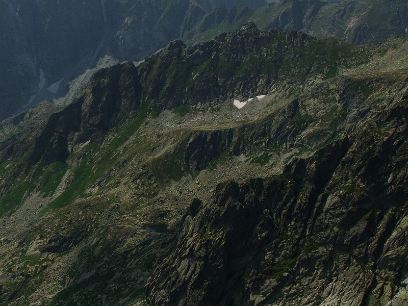 Vyšné Žabie pleso Mengusovské